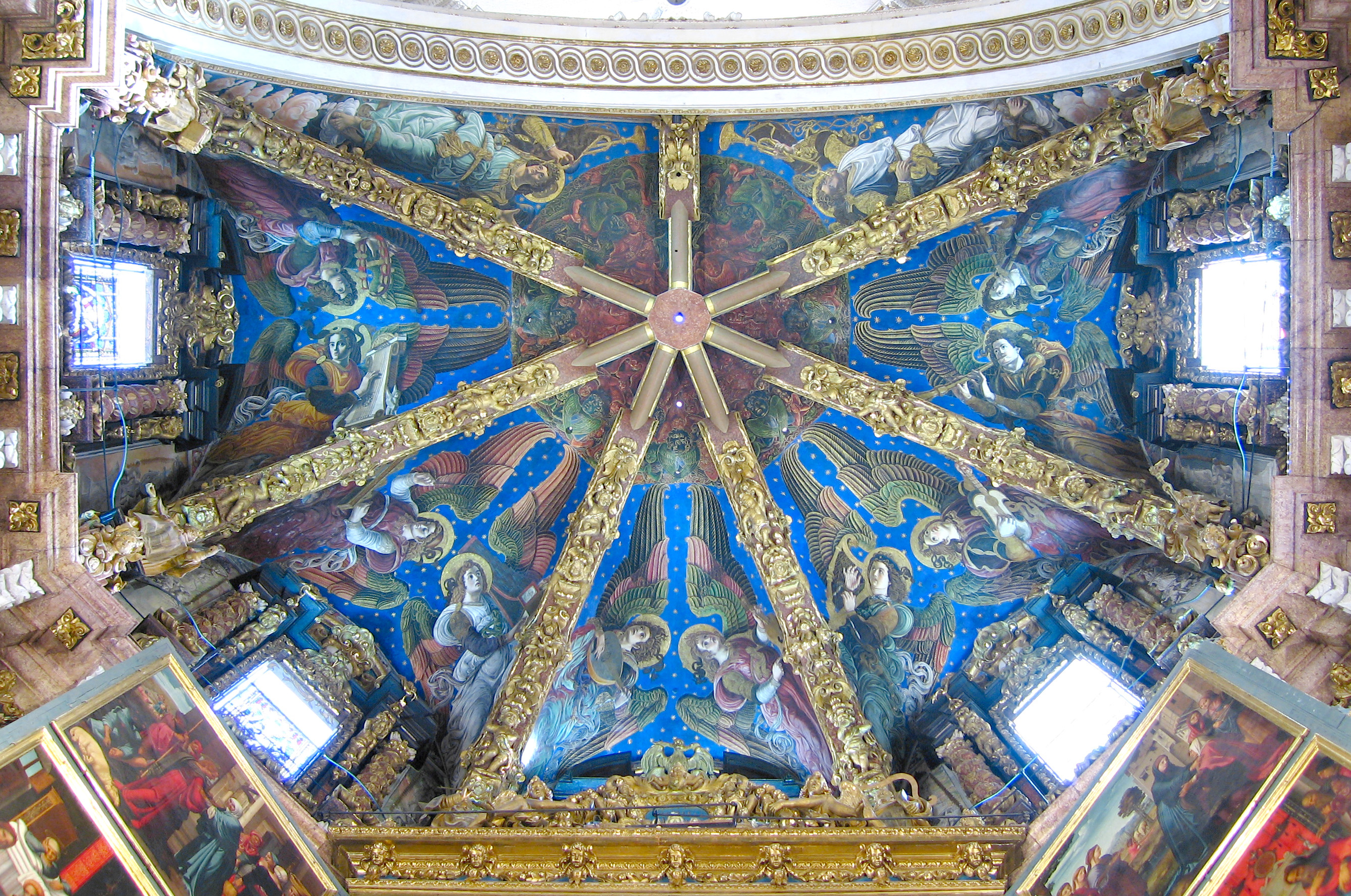 Volta de l'Altar Major de la Catedral de València amb pintures de Paolo de San Leocadio i Francesco Pagano que representen àngels tocant instruments musicals, datades en 1474.